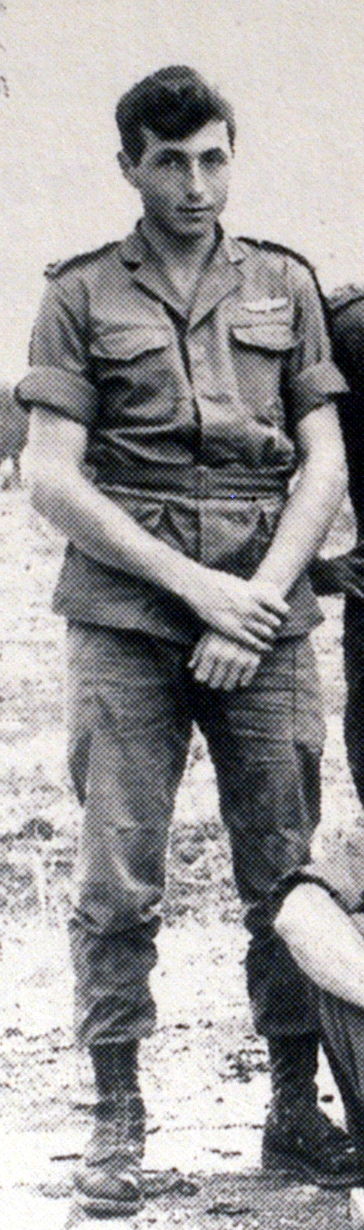 Lt. Meir Har-Zion after Operation Egged, November 1955.